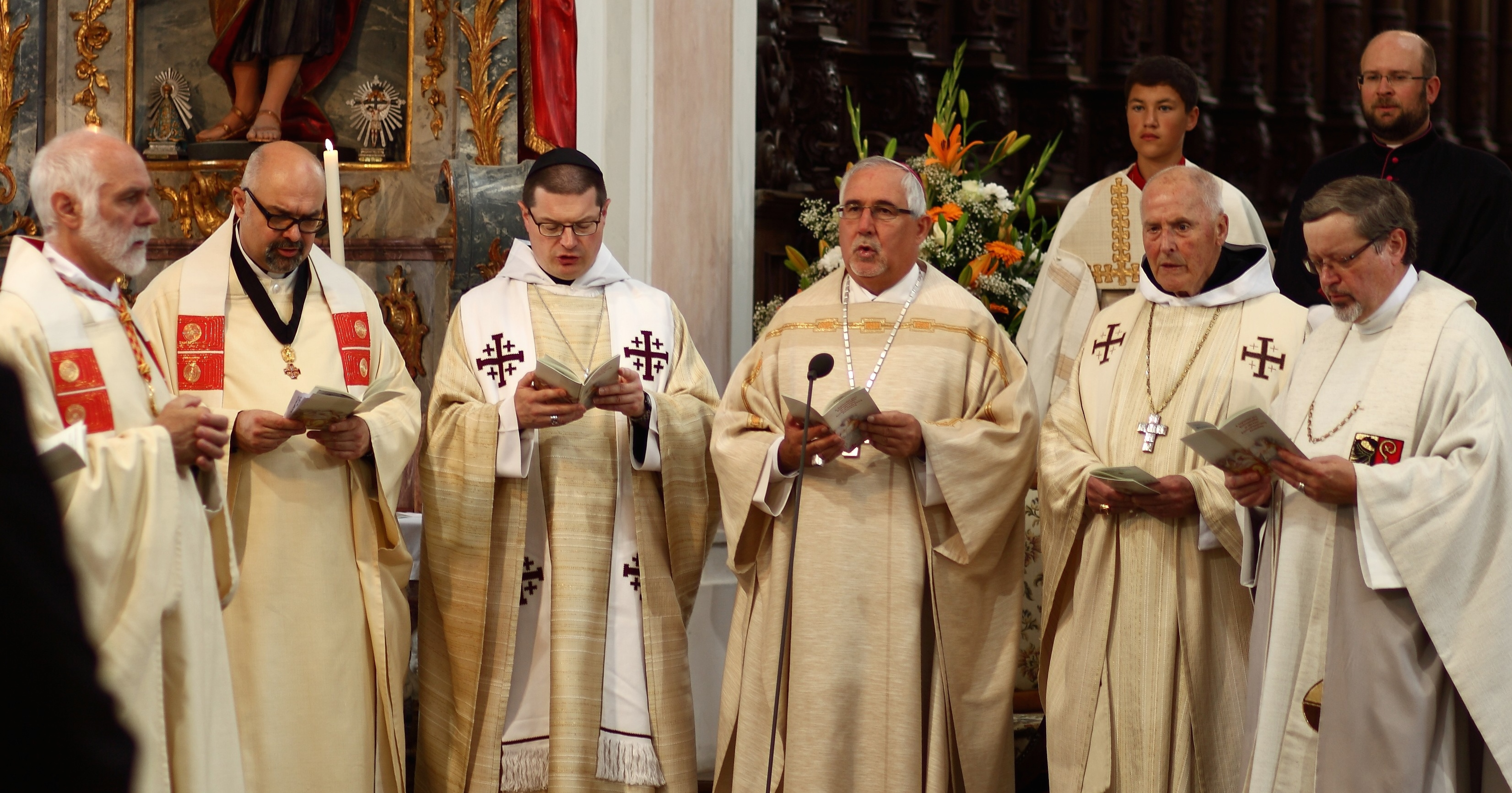 Bischof Gebhard Fürst mit Erzabt Tutilo Burger OSB und Altabt Kassian Lauterer OCist bei der 50. Jahrfeier Komturei Ravensburg des Ritterordens vom Heiligen Grab zu Jerusalem in der ehm. Klosterkirche Ochsenhausen am 6. September 2014